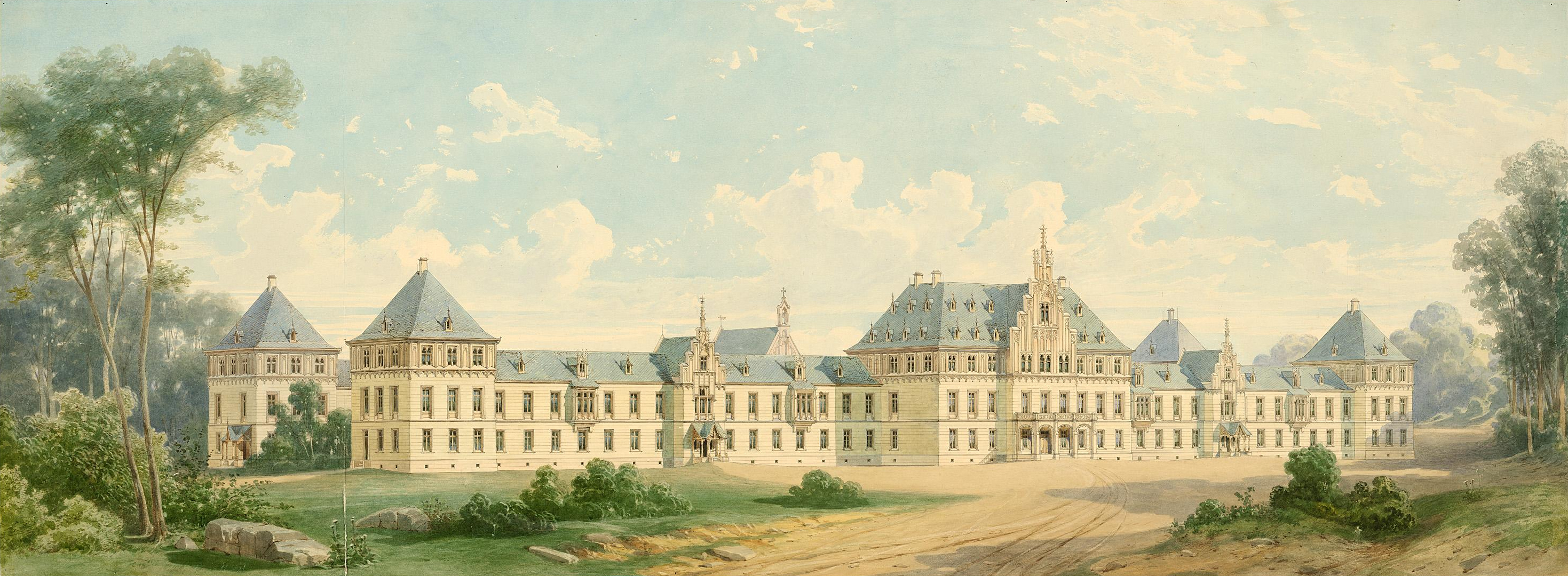 Perspektivische Vorderansicht der Städtischen Irrenanstalt Frankfurt am Main Handzeichnung des Architekten Oskar Pichler Material/Technik: Tusche aquarelliert auf Karton Maße (h x b): 47.7 x 128 cm (s)